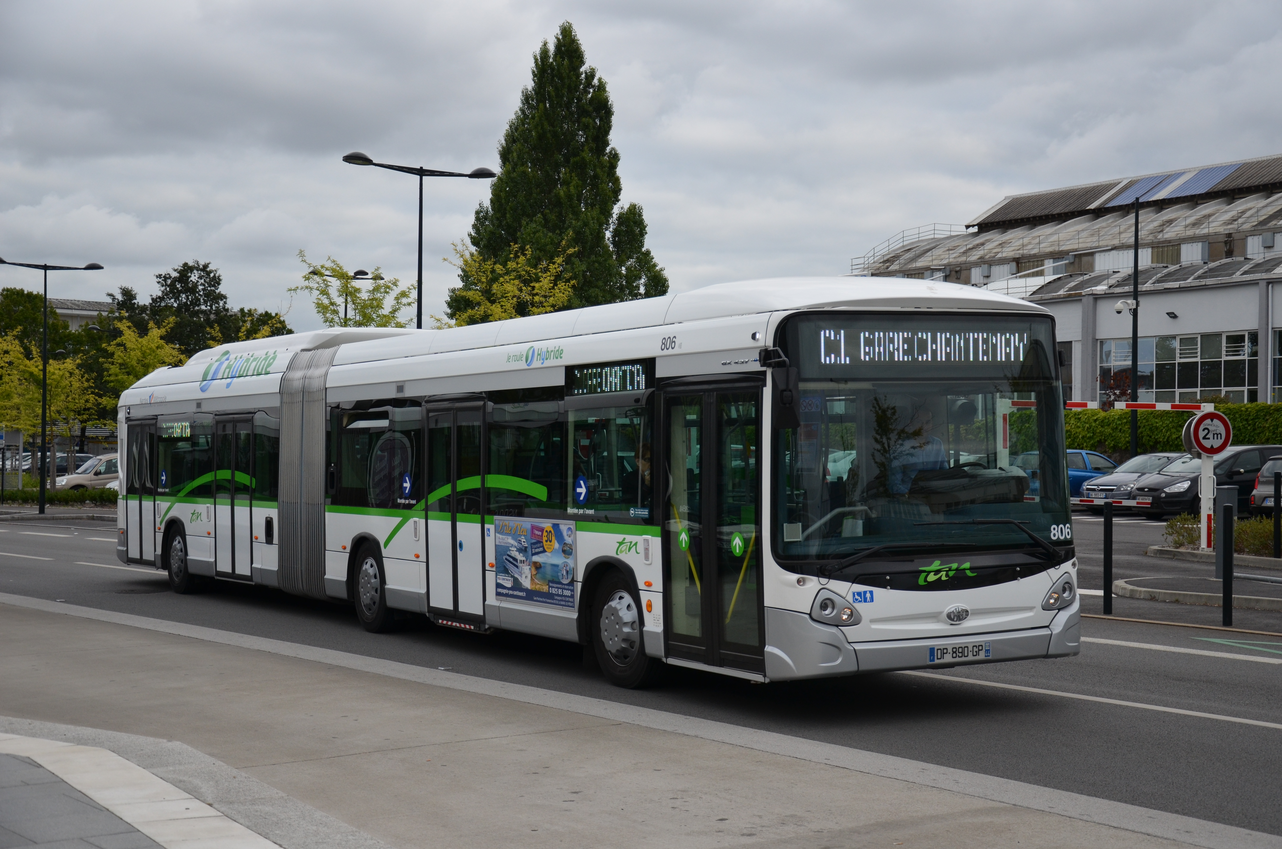 Heuliez GX 437 Hybride sur la ligne C1 du réseau TAN de Nantes, quittant son arrêt à Haluchère.